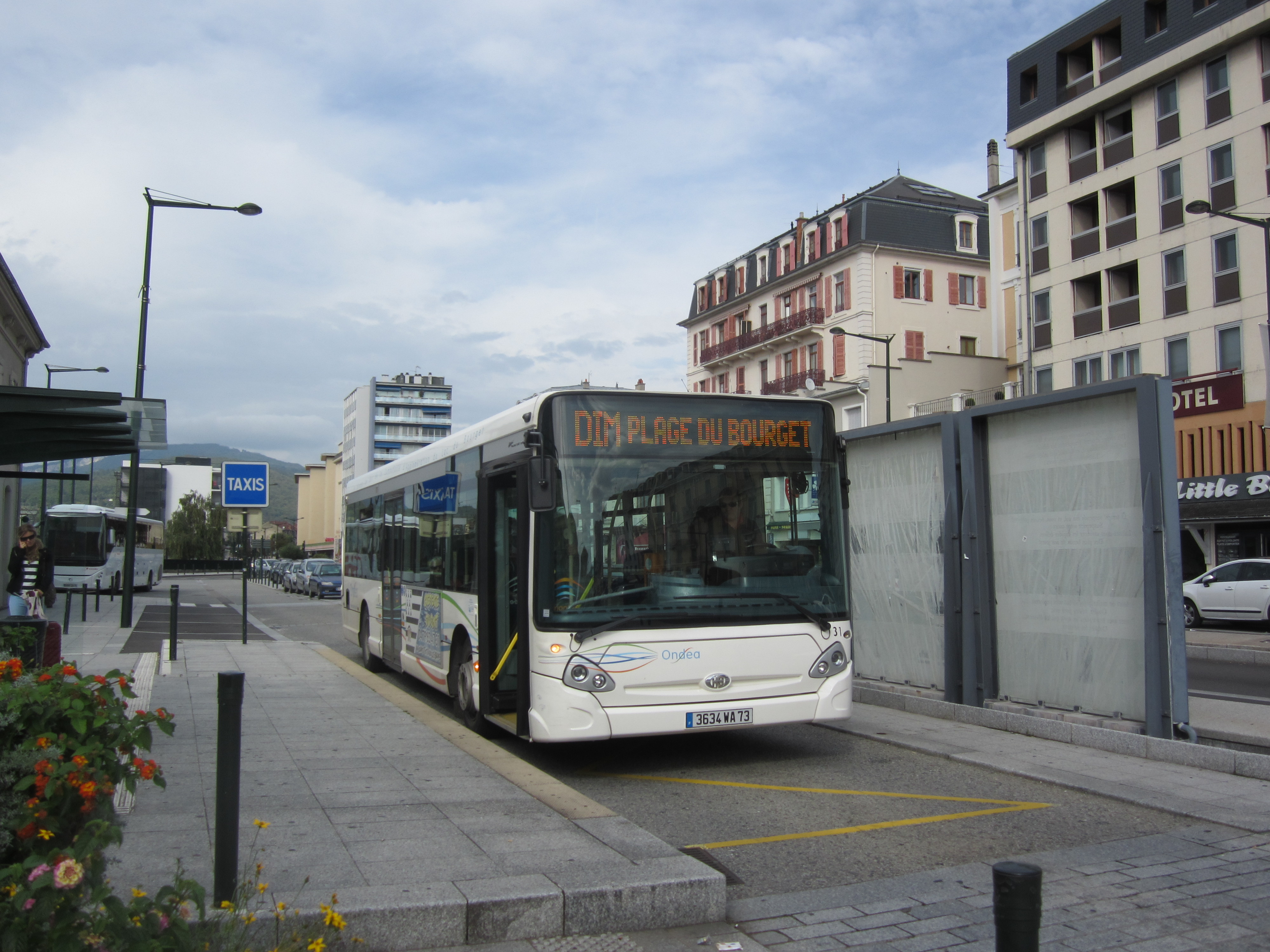 Heuliez GX 327 n°31 à la gare SNCF, sur le réseau Ondéa d'Aix-les-Bains.